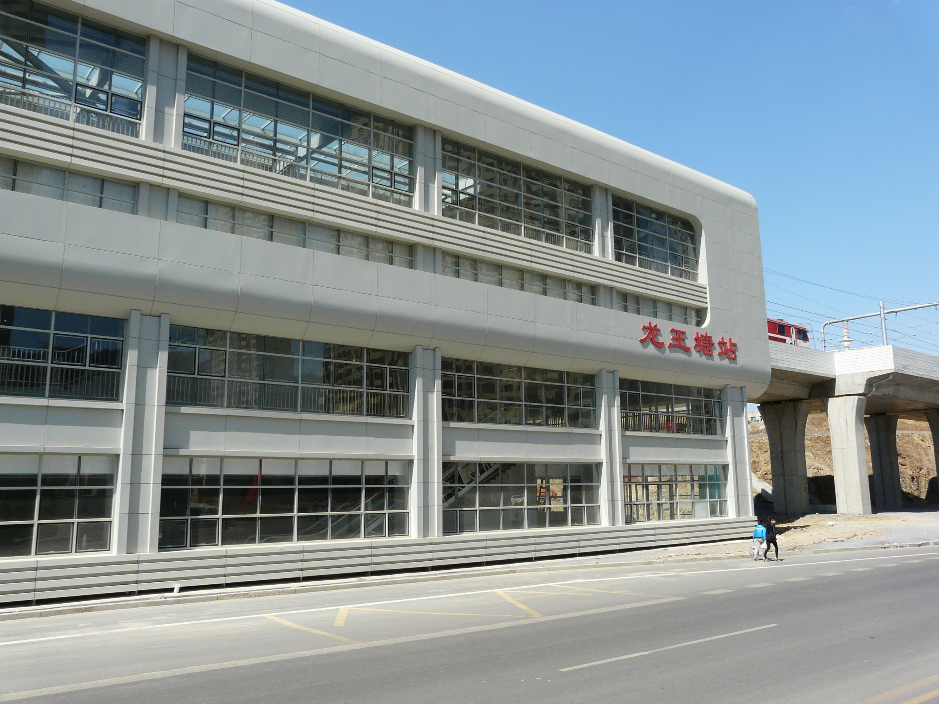 大连快轨8号线 龙王塘站